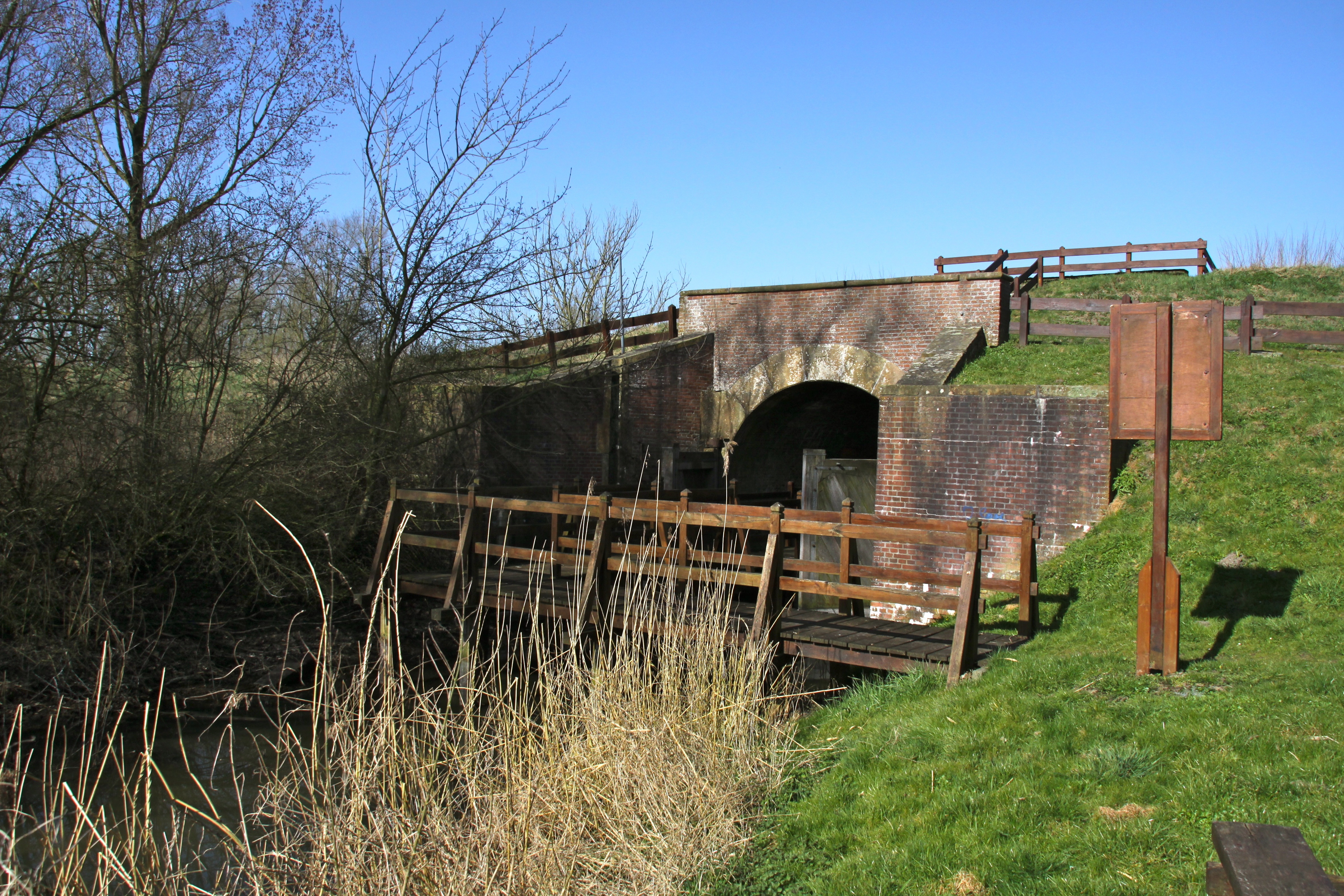 Stillgelegtes, begehbares Sieltor in Weekeborg